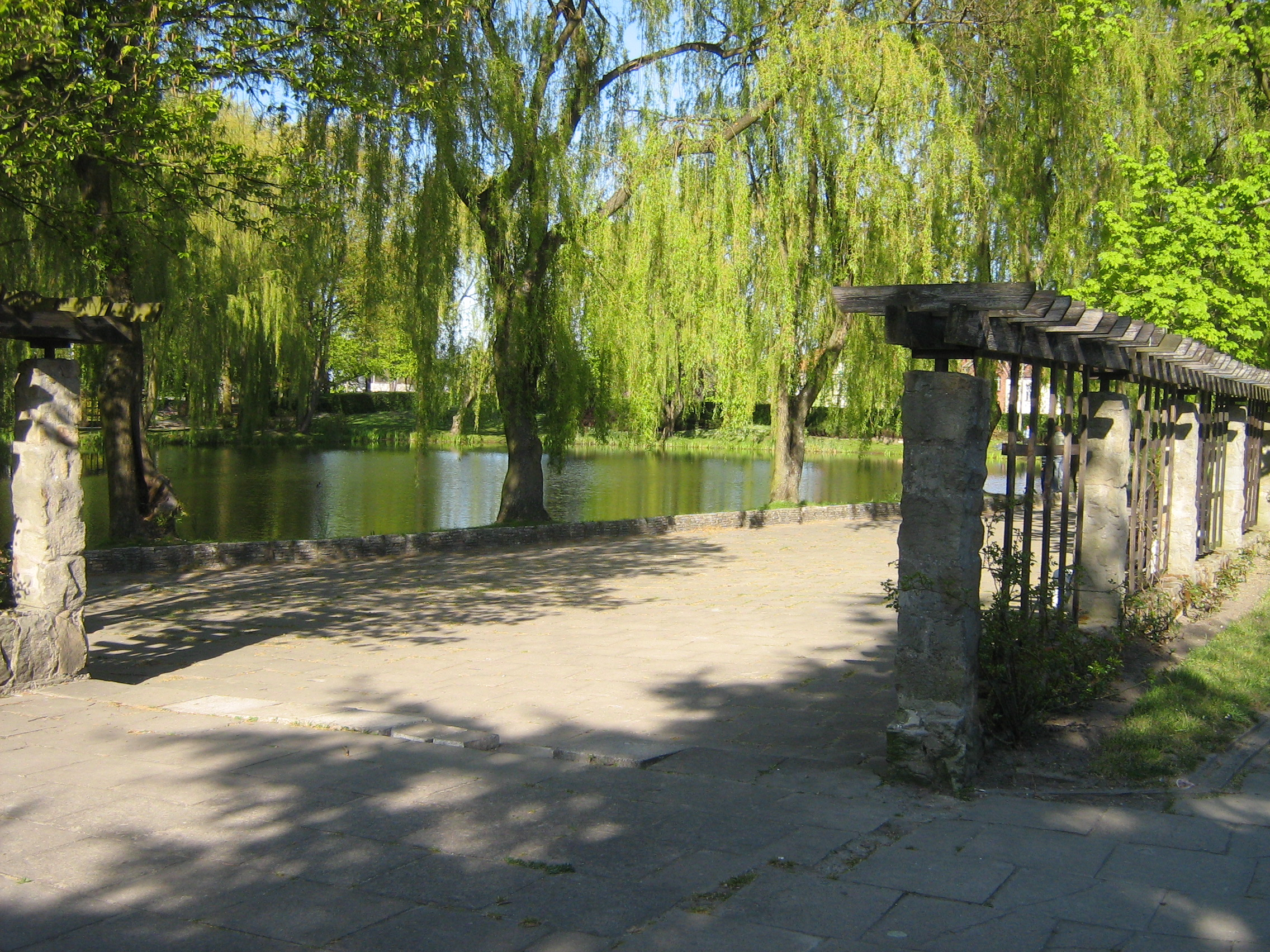 Niższy staw w Parku Oruńskim